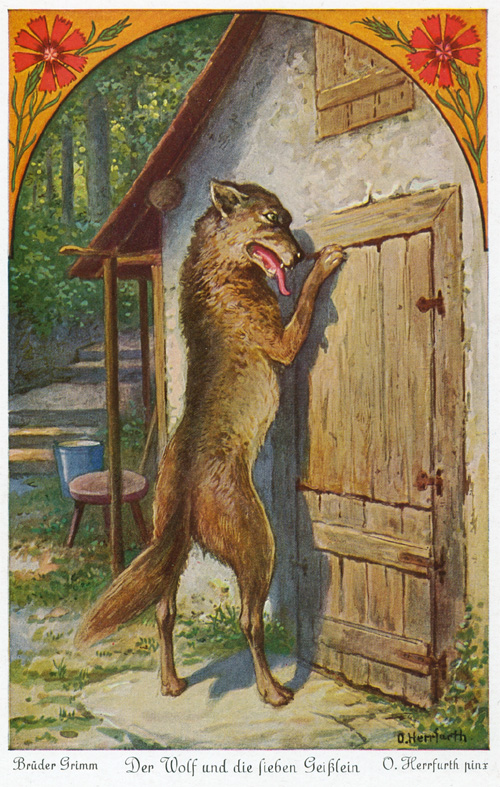 Der Wolf und die sieben Geißlein. Postkartenserie nach dem Märchen. Serie von sechs Postkarten der Firma Uvachrom. Serie 265, Nr. 4517 Text der Rückseite: Bald darauf klopfte jemand an die Tür des Geißenhauses und rief: „Macht auf, liebe Kinder, eure Mutter ist da und hat jedem etwas mitgebracht!“ Die sieben Geißlein erkannten aber an der rauhen Stimme den Wolf und sagten: „Du bist nicht unsere Mutter, die hat eine feine Stimme.“ Und die Türe blieb verriegelt.